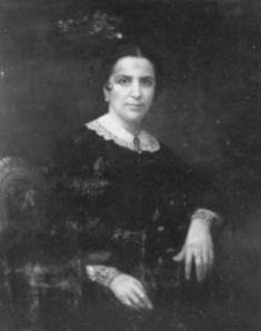 Obra da coleção Brasiliana Iconográfica.